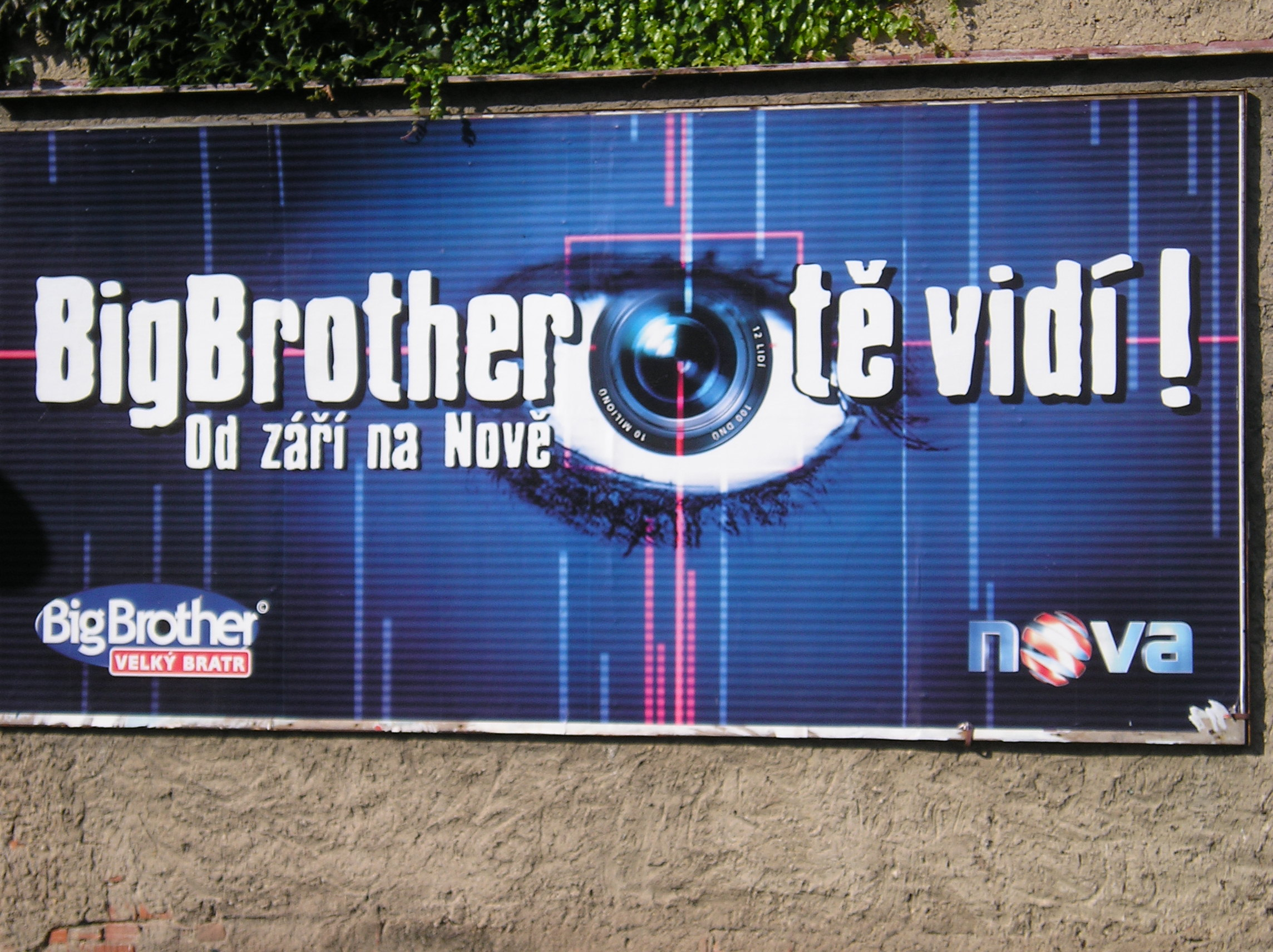 Billboard lákající ke sledování televizní realityshow Big Brother